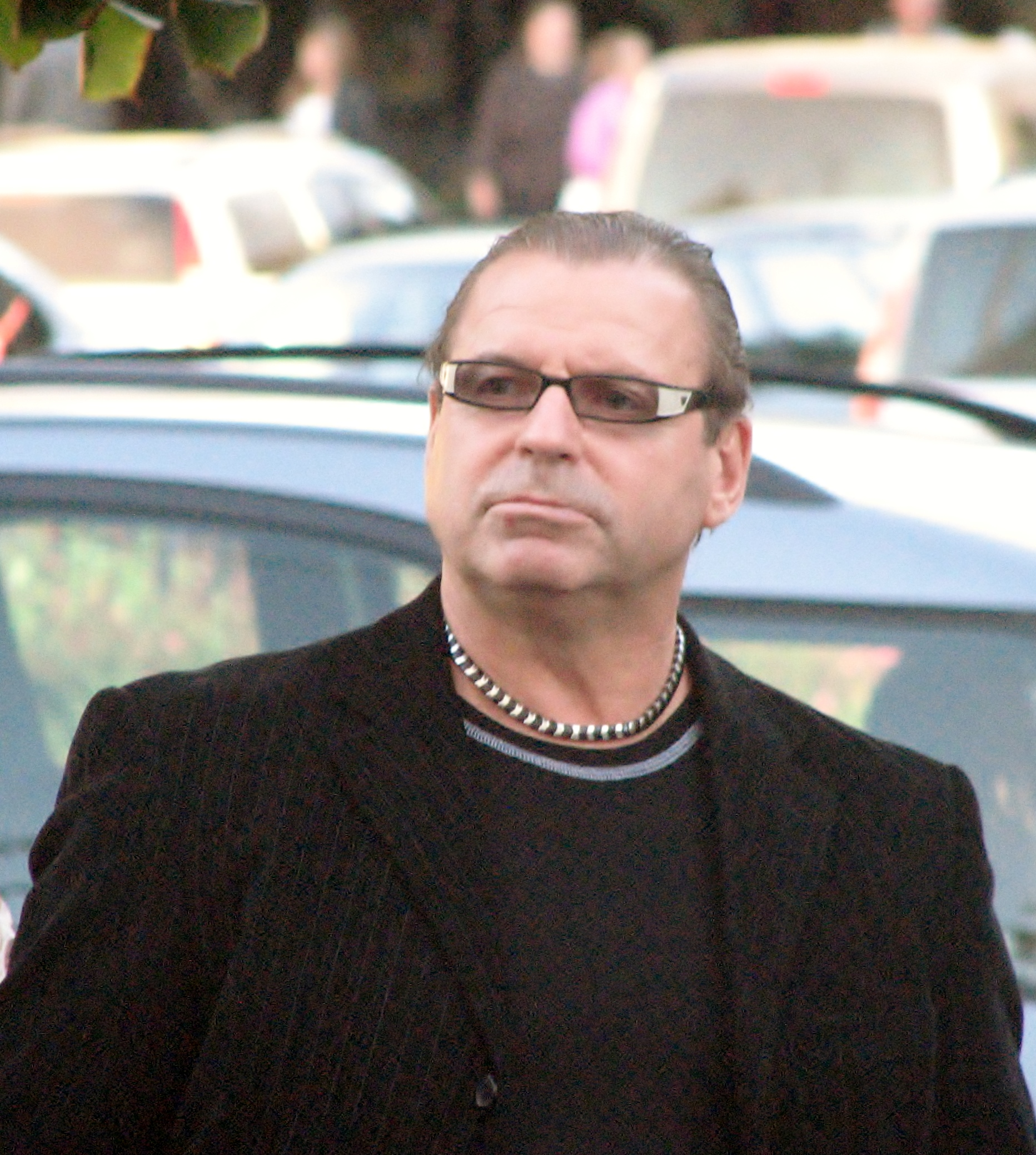 Erich Krieger Estonia awamise peo eel